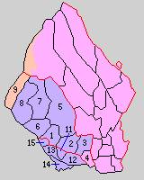 栃木県足利郡の町村。